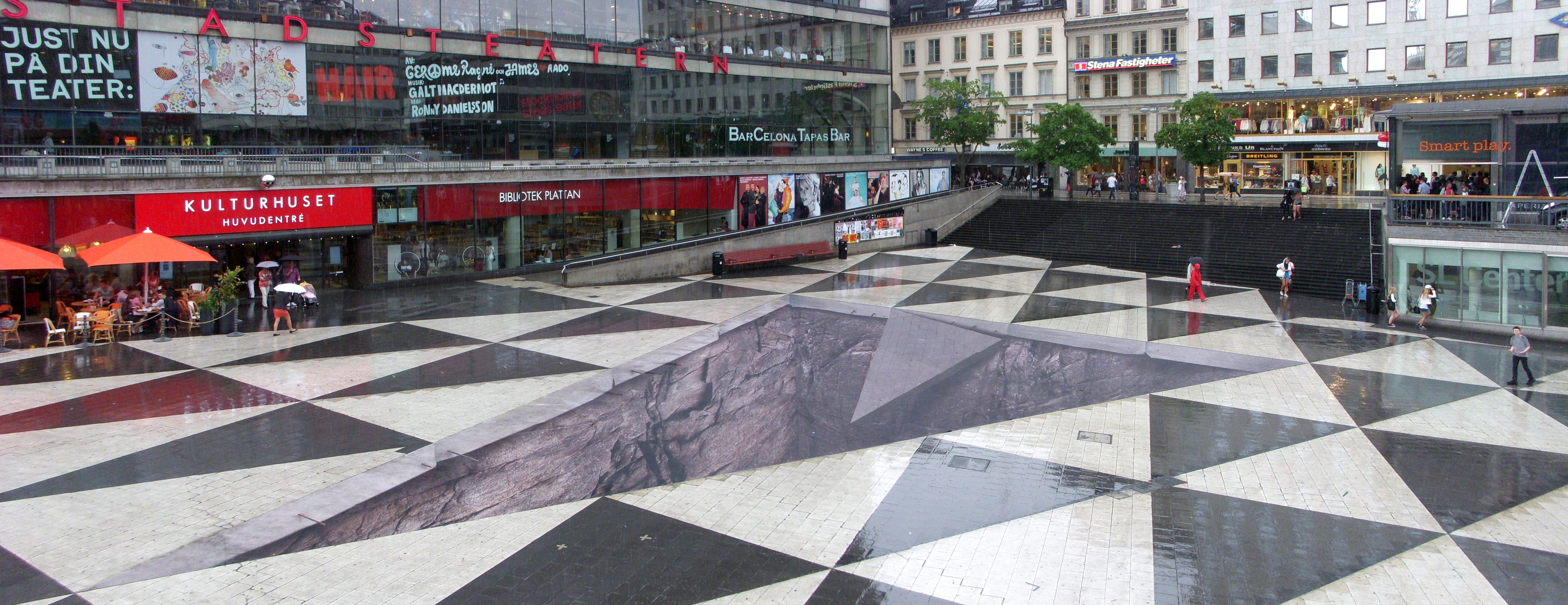 "Hålet" i Plattan: Mind your step, fotoillusion på Sergels torg av Erik Johansson